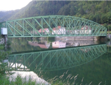 Stari most čez Savo v Radečah, služi pešcem, je tehnični spomenik.